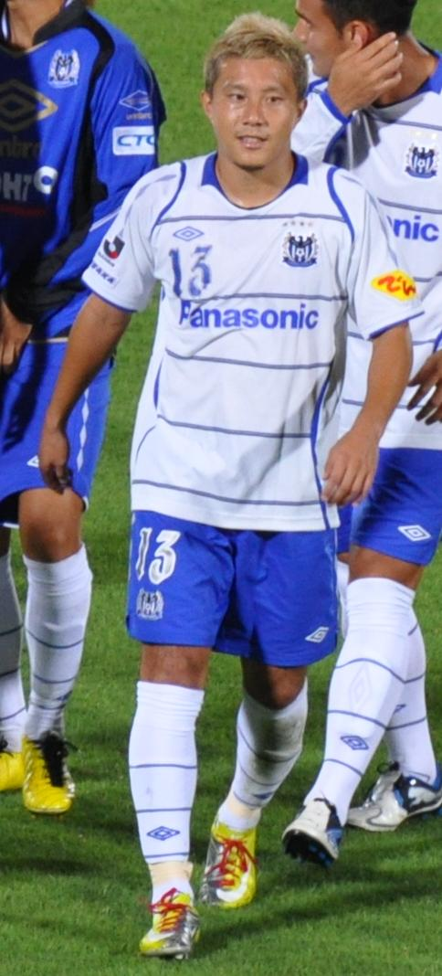 Kawasaki Frontale vs Gamba Osaka_436